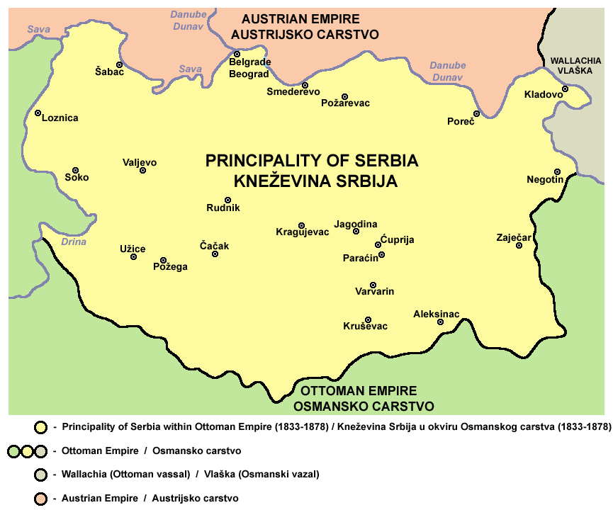 Principality of Serbia in 1833-1878. Kneževina Srbija, 1833-1878.